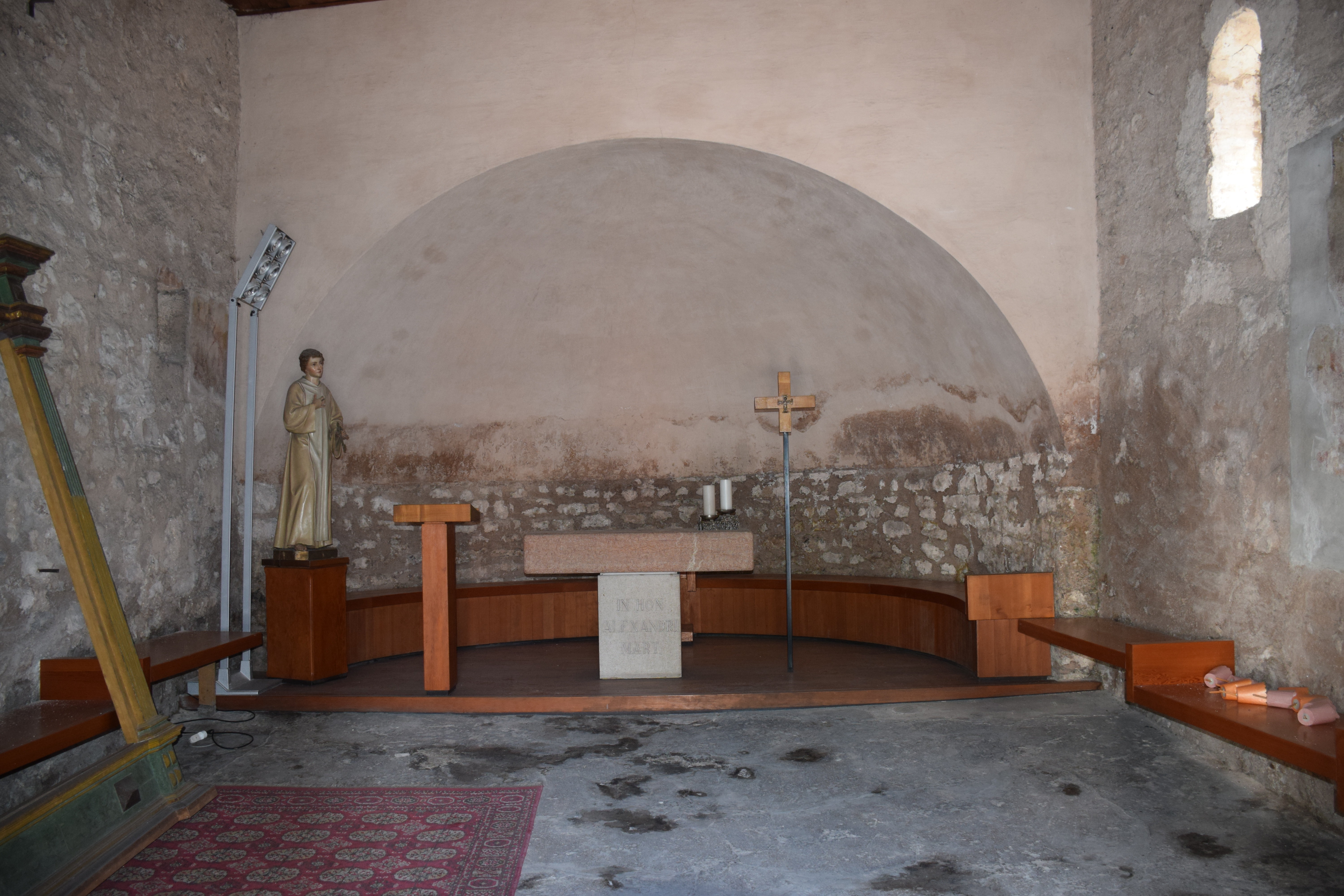 Zona absidale